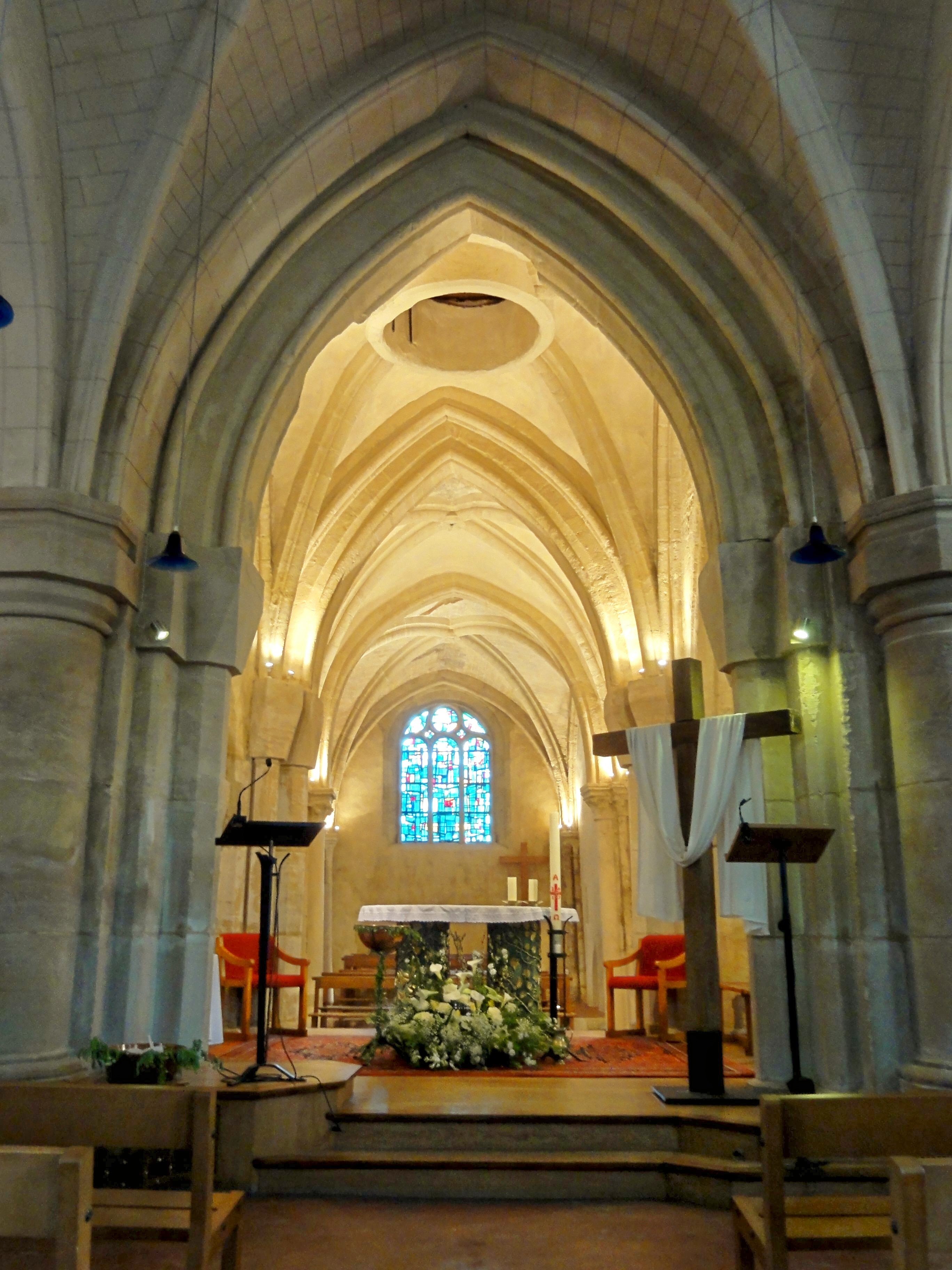 Vue sur le transept et le chœur depuis la nef (l'autel est actuellement placé dans la croisée du transept).